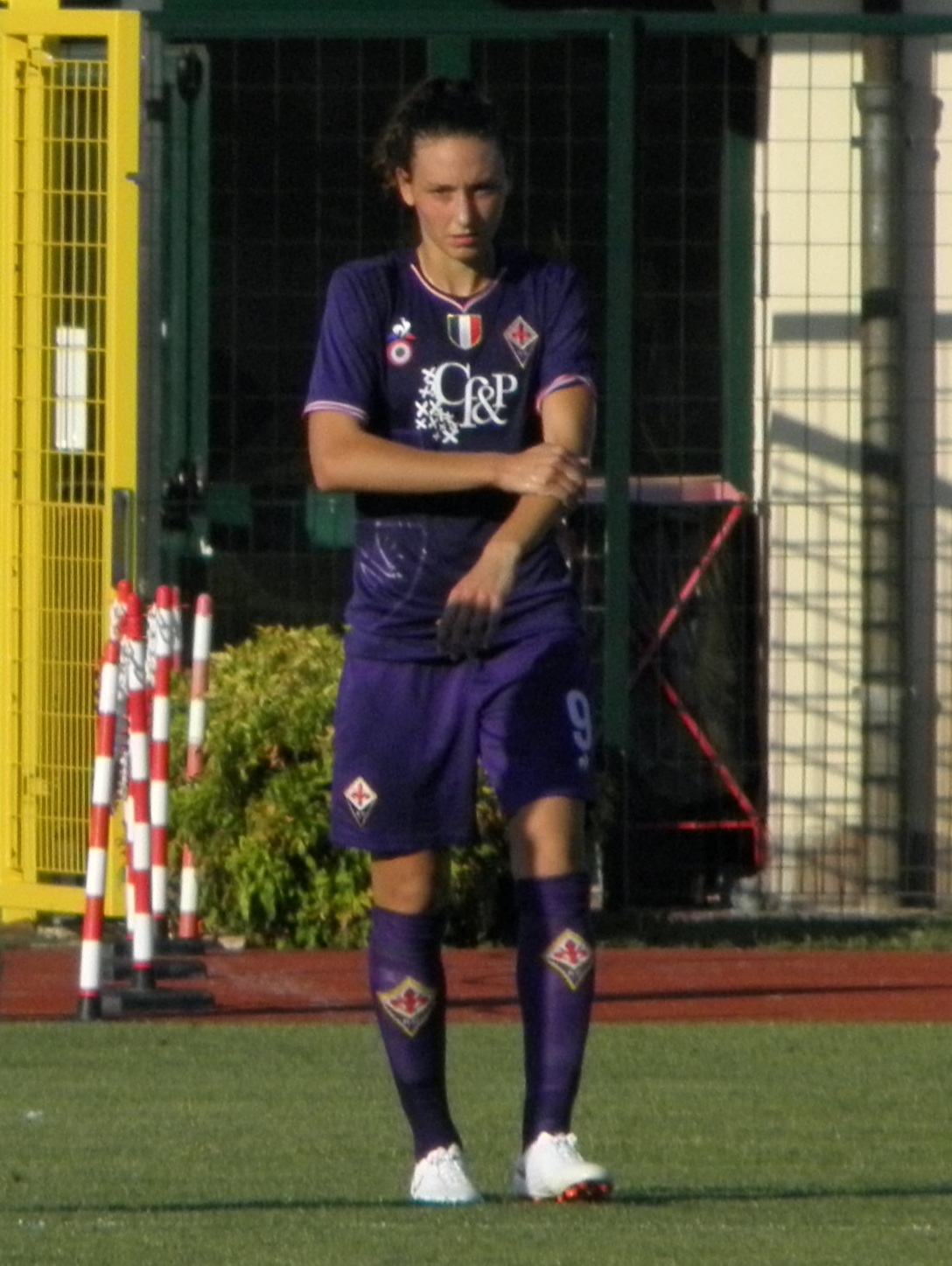 Abano Terme, Stadio delle Terme: 16 giugno 2018, spareggio UEFA Women's Champions League. Ilaria Mauro.